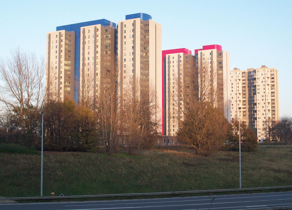 Silvertoptorens